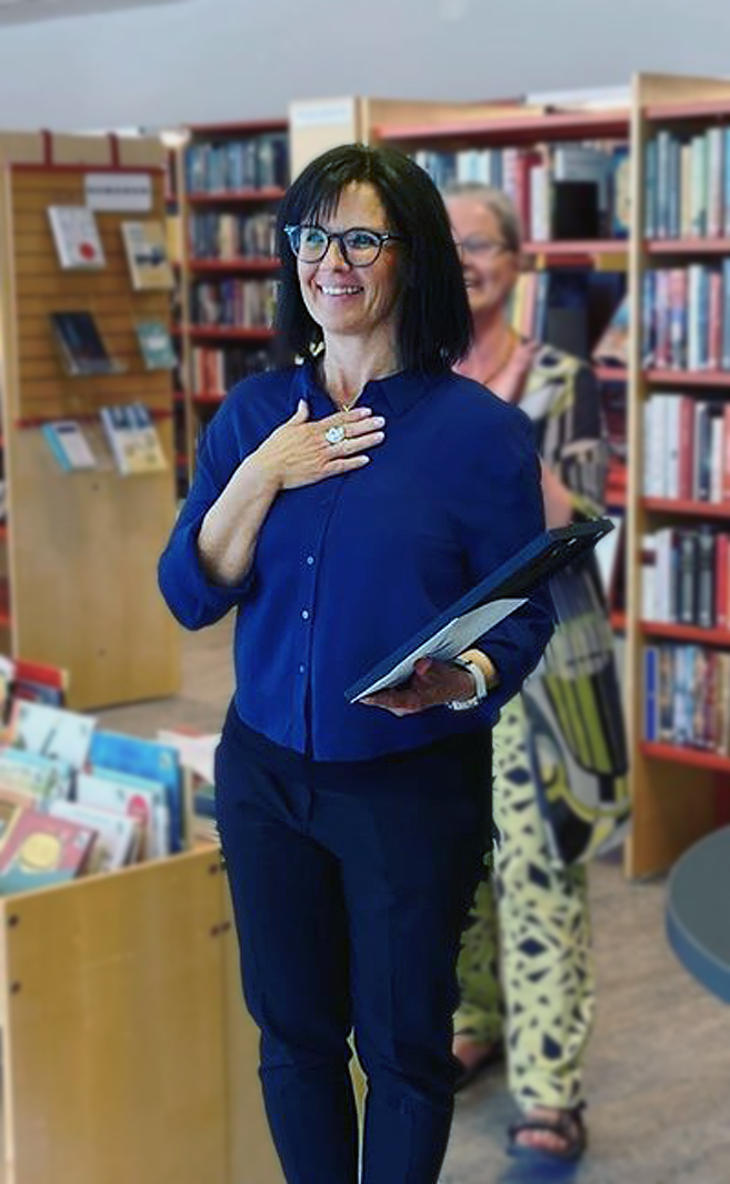 Agneta Norrgård, efter att hon mottagit utmärkelsen Årets läsfrämjare 2020 i Sundsvalls kommun.